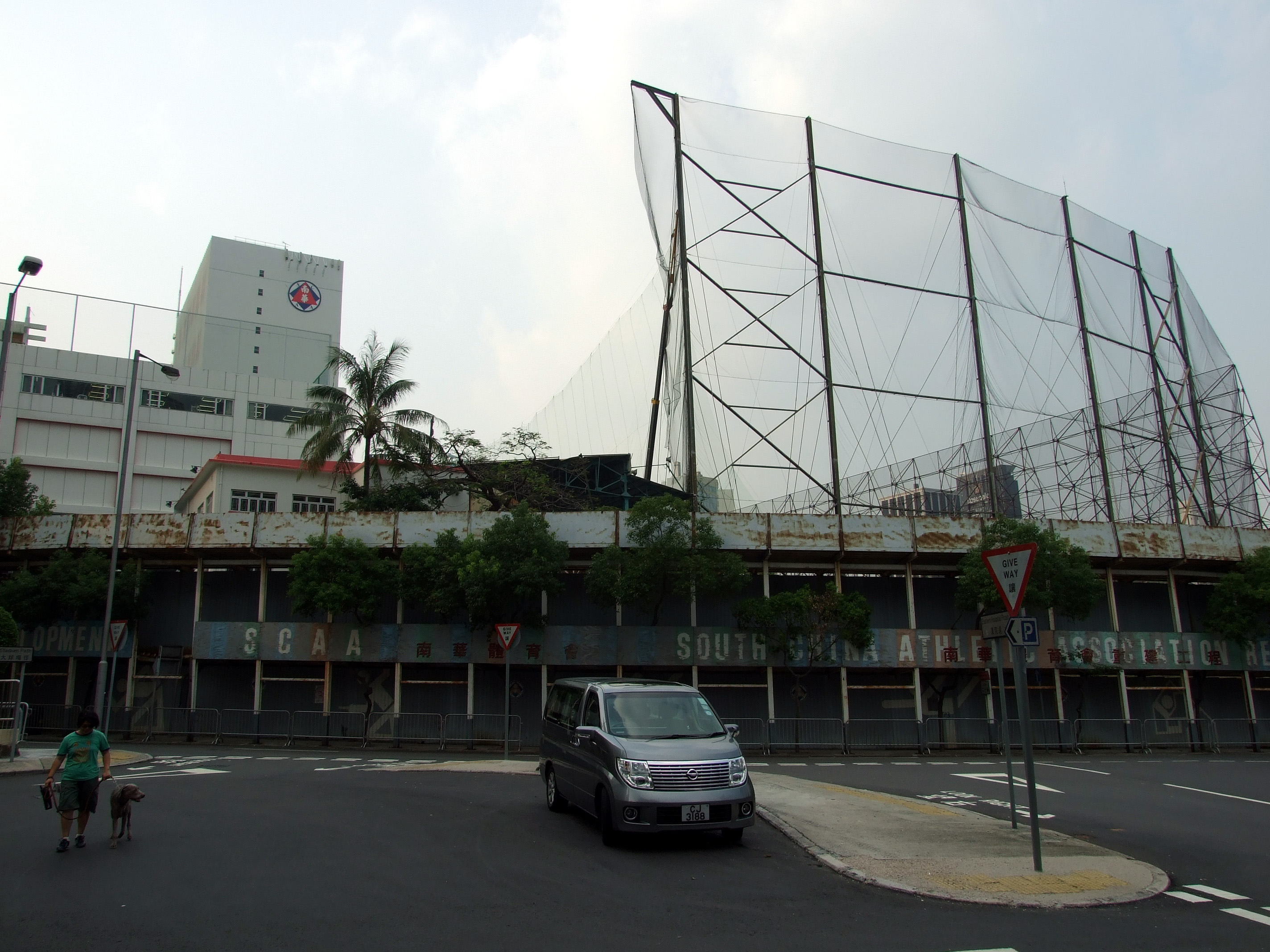 中文（香港）: 南華會加路連山球場